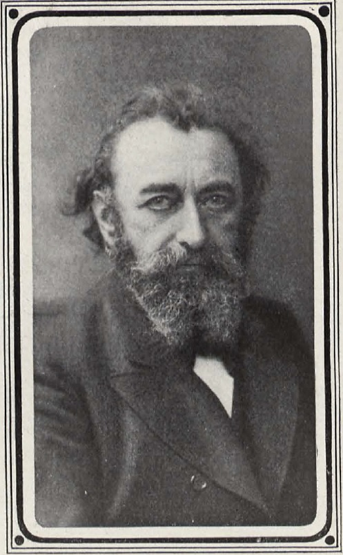 Alfred Klaar (urspr. Aaron Karpeles, 1848-1927), Journalist, Schriftsteller, Theaterkritiker.